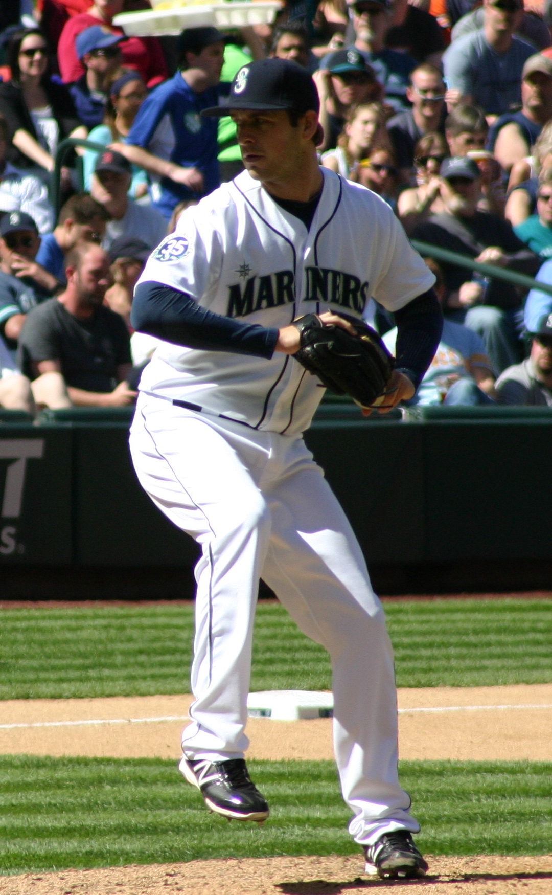 Lucas Luetge